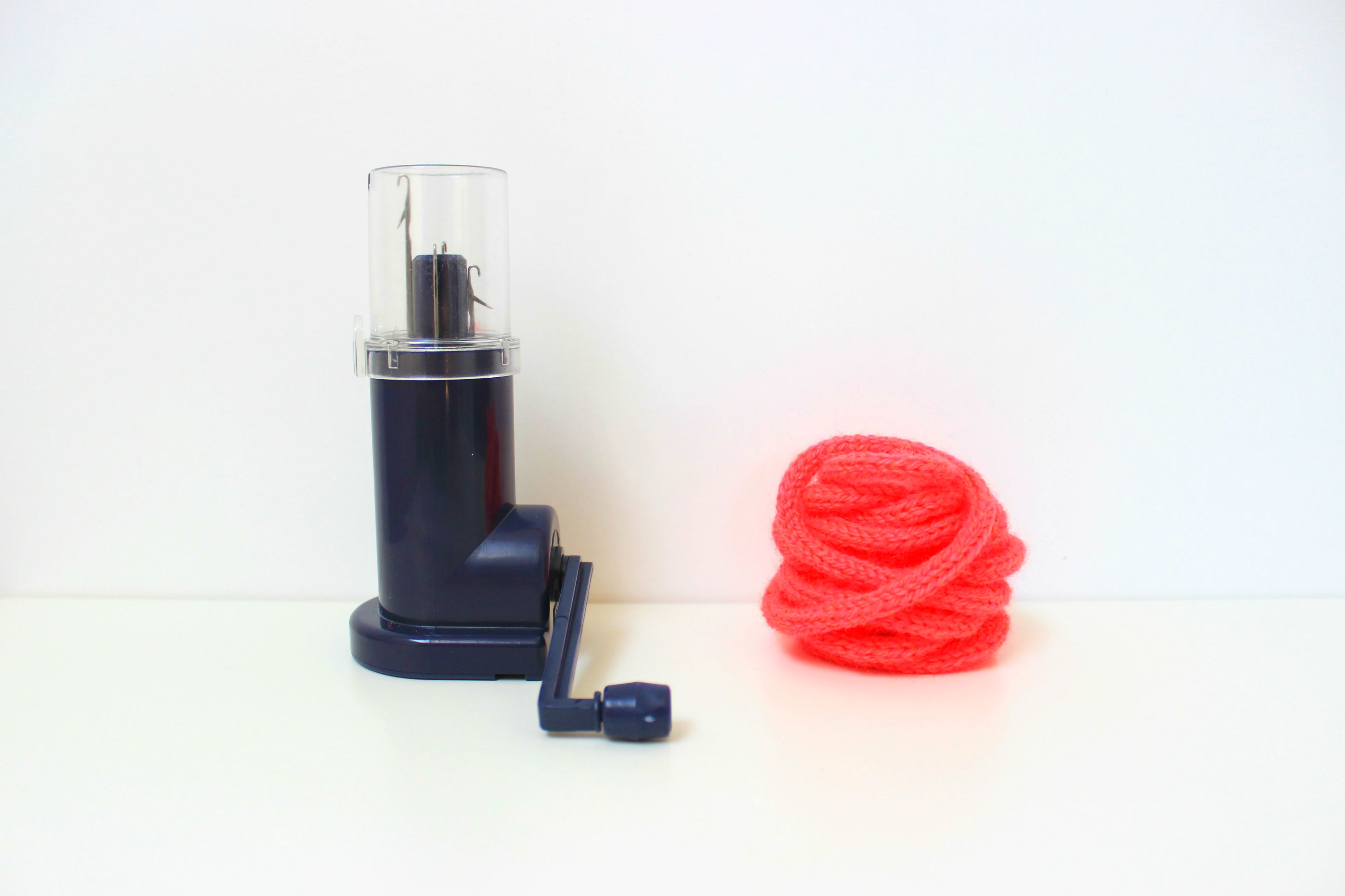 Mulinetto da maglia automatico per la realizzazione di tubolari di lana